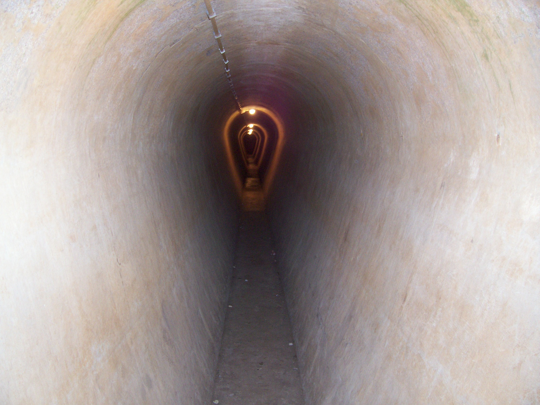 Tunnel in Fort Kijkduin